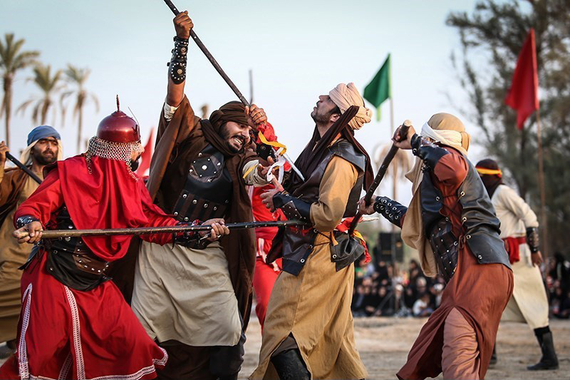 تعزیه روز عاشورا در روستای نظرآقا - بوشهر